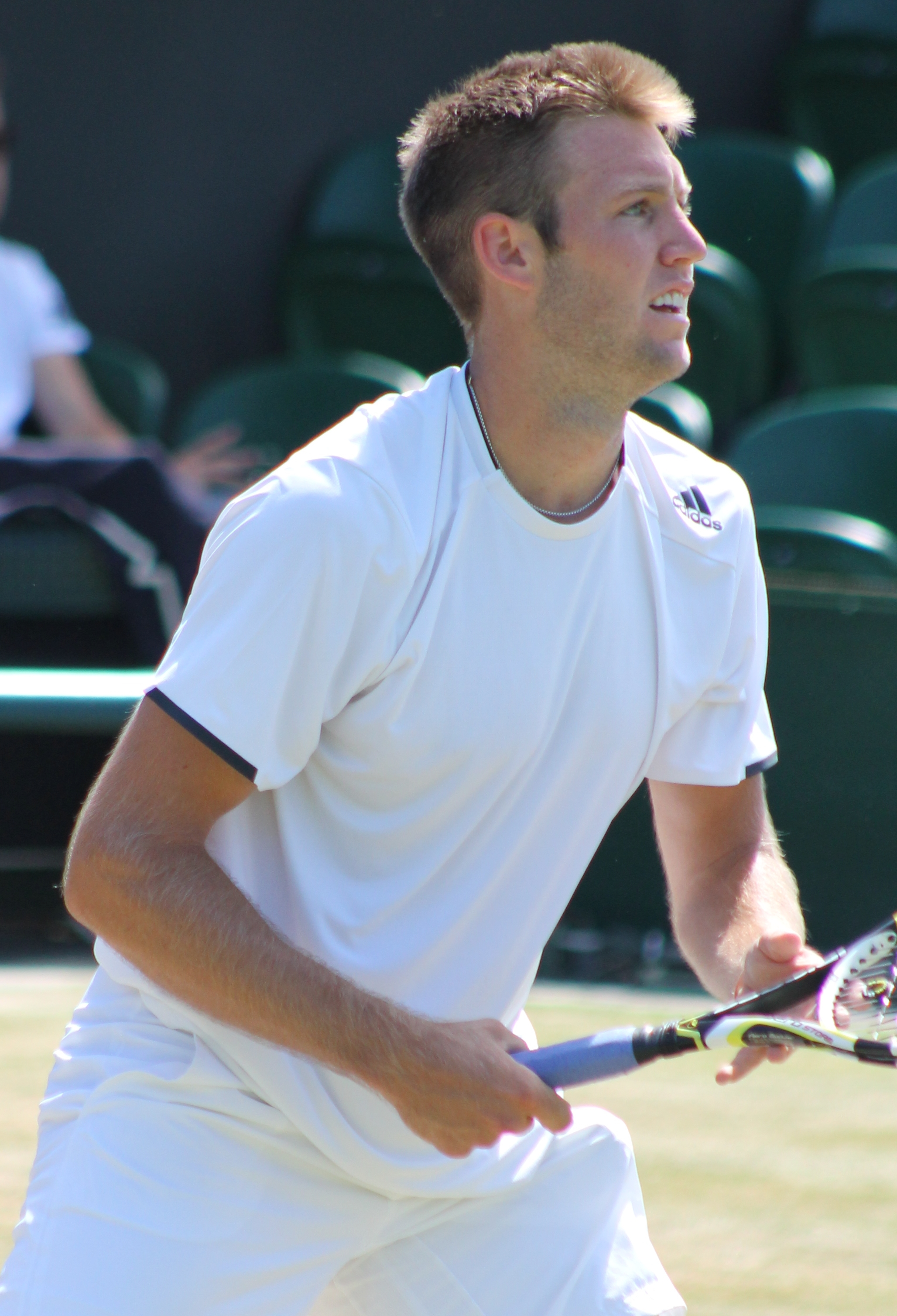 Sock WM14 (3)